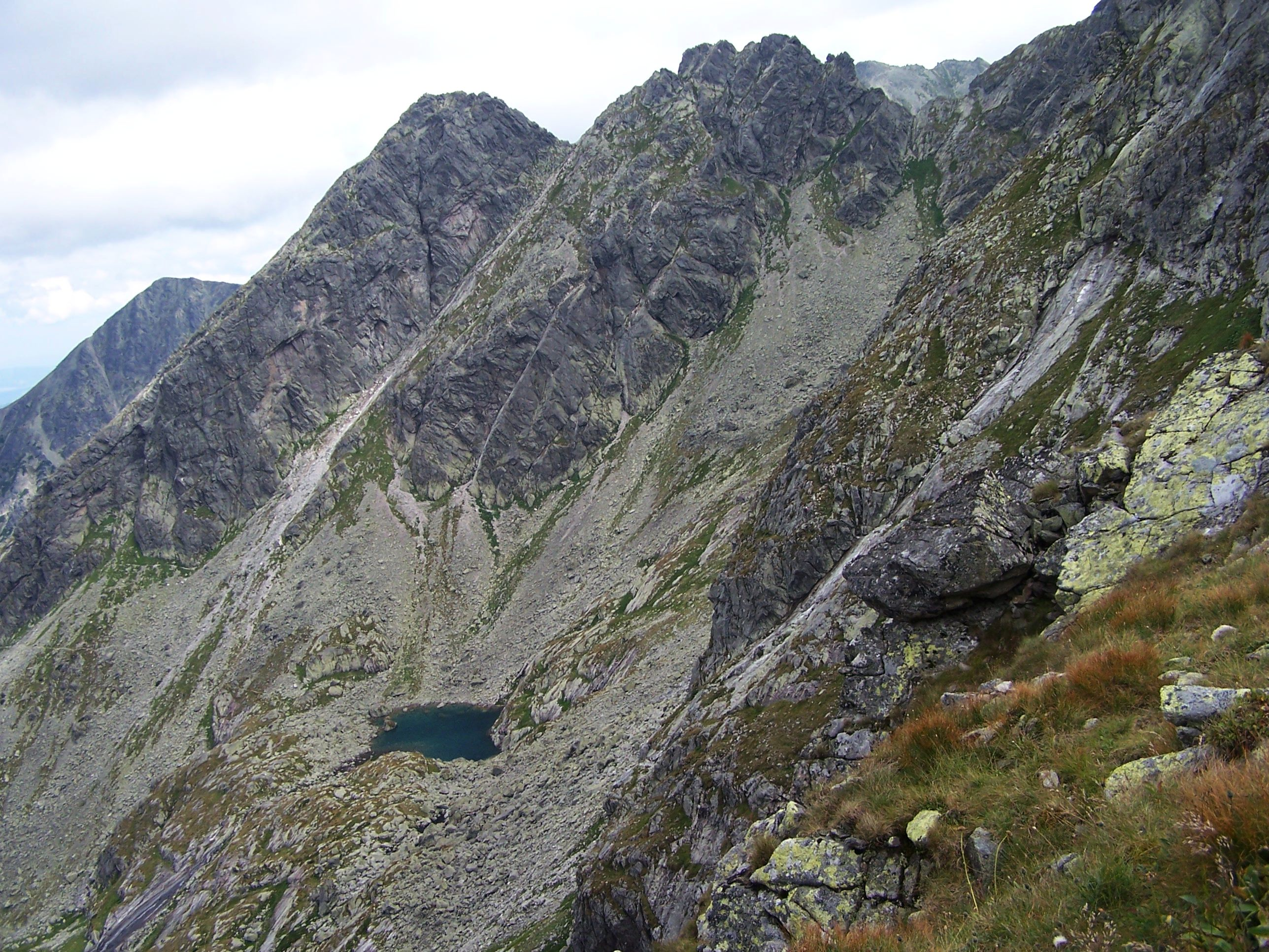 Kościelec, Zadni staw Gąsienicowy (Tatra Mountains